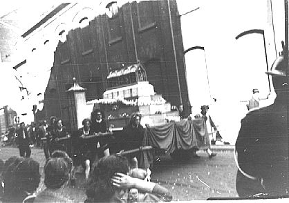 Fête-Dieu 1946. Cortège rue Saint-Laurent Liège. Photo d'archive de l'Institut Saint-Laurent Liège.